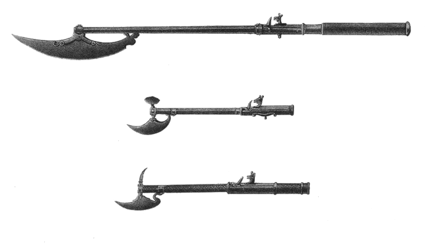 Огнестрельное оружие в XVII столетии, пищаль с топором и пистоли с топорками.